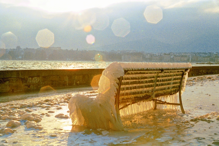 Verglas sur la Rade à Genève